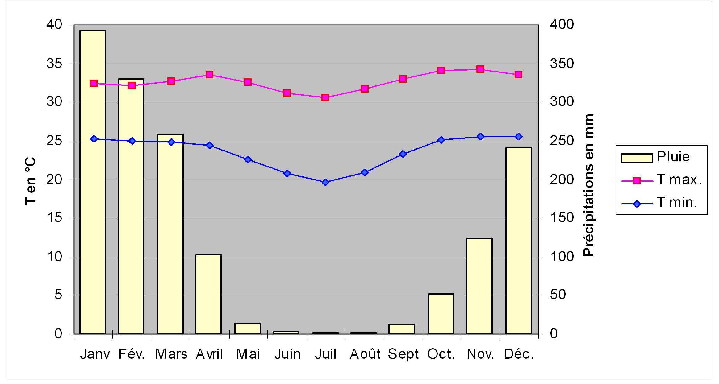 Diagramme climatique de la ville de Darwin (Australie), comprenant deux courbes, représentant les températures maximales et minimales, et un histogramme, représentant la pluviométrie, pour les douze mois de l'année.